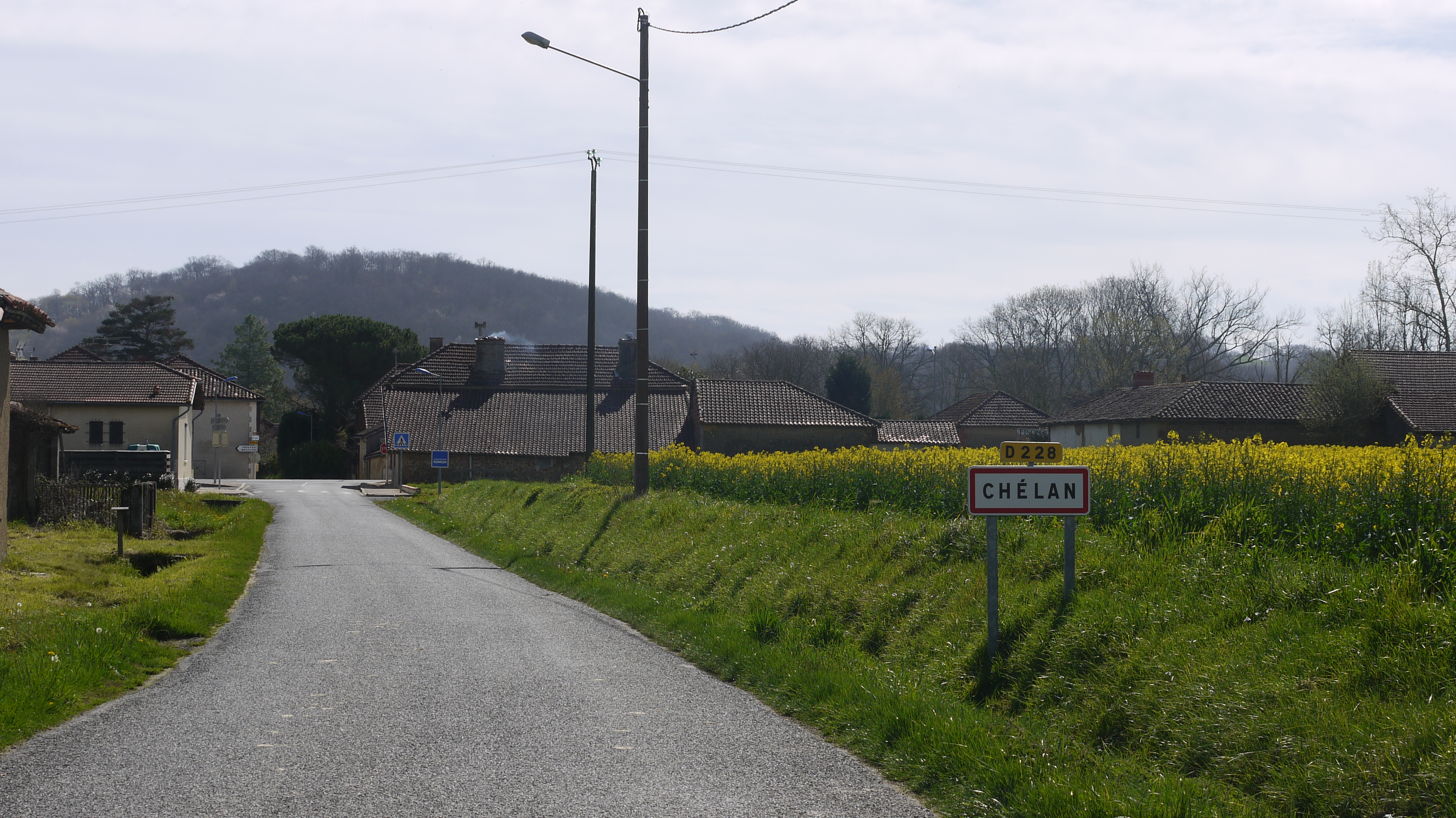 Entrée de Chélan sur la route D228.